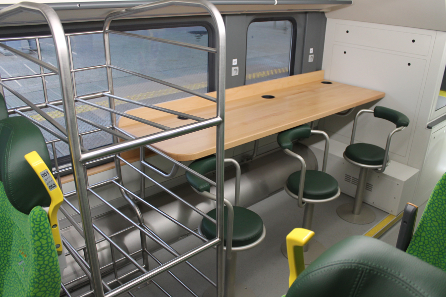 Przedział gastronomiczny w piętrowym wagonie sterowniczym Pesa Sundeck 316B-002.